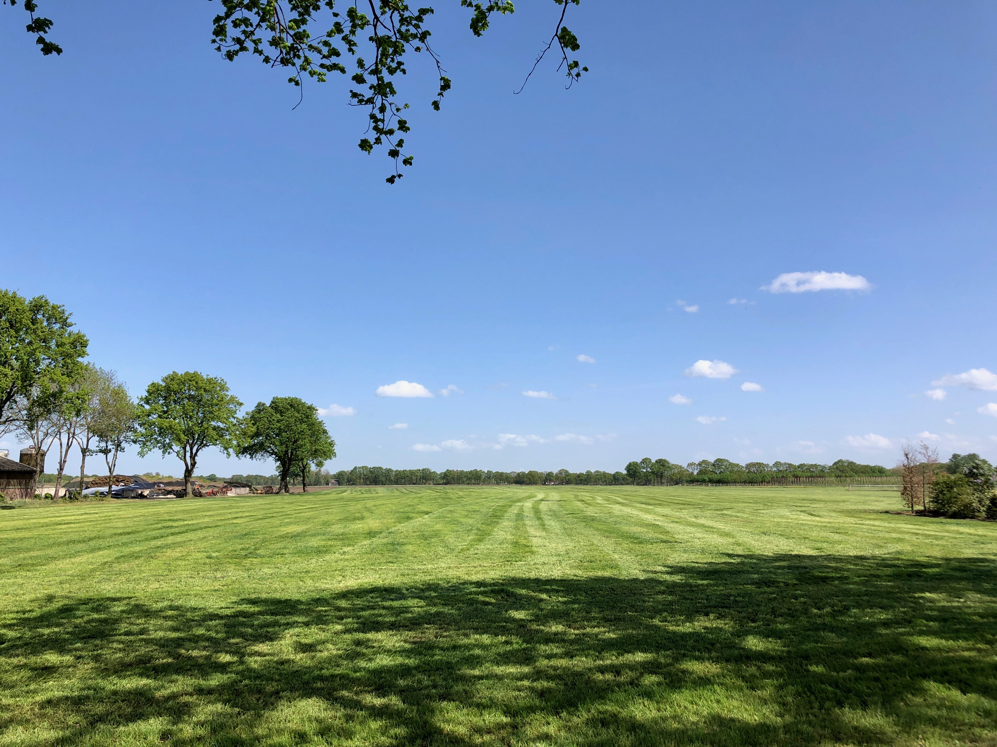 Buitengebied 'Lage Vugt' nabij Groenstraat Teteringen